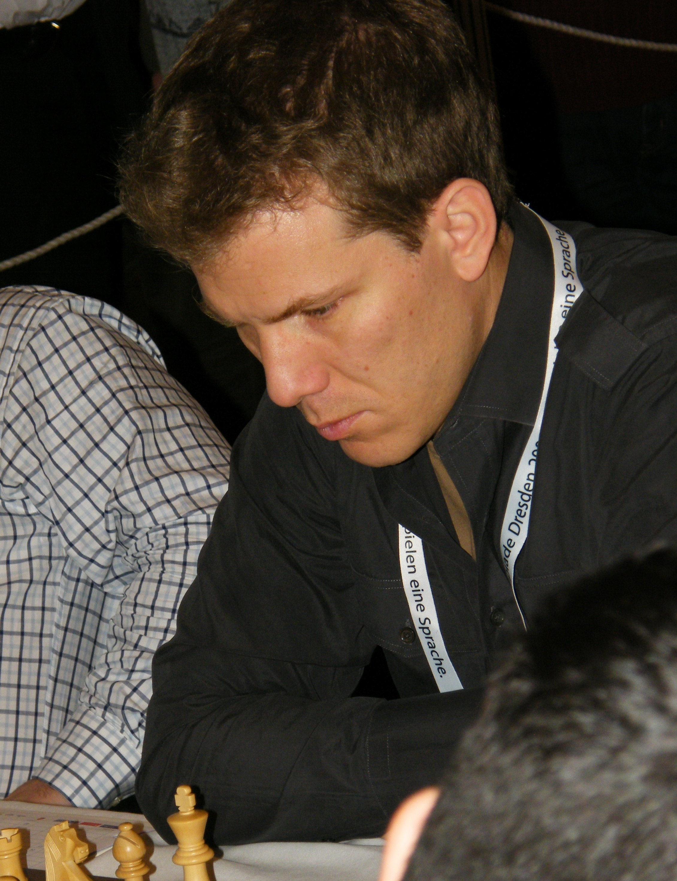 Tiger Hillarp Persson bei der 38. Schacholympiade in Dresden 2008